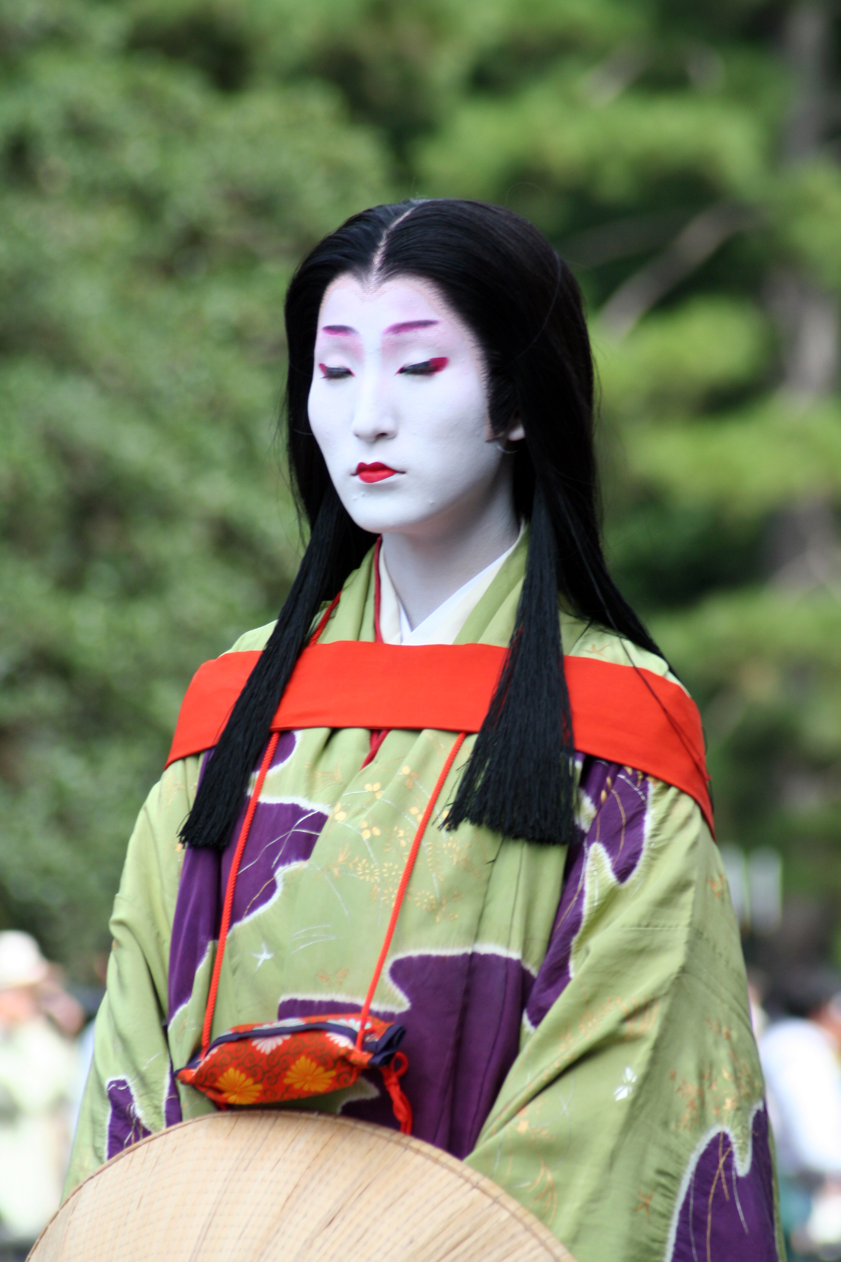 京都府京都市にて開催された時代祭。正午の御所から平安神宮までの行進の様子。2009年10月22日撮影。